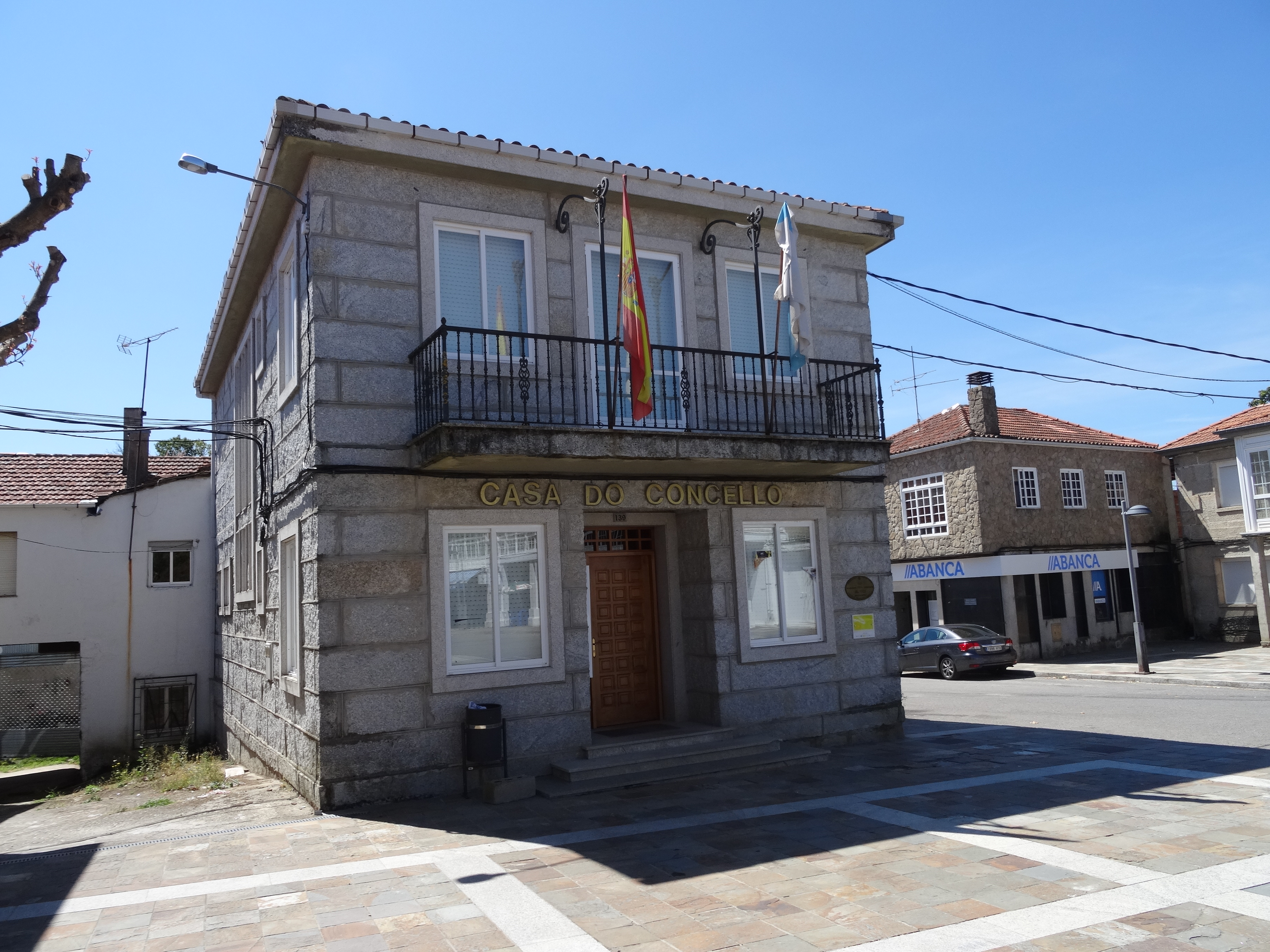 Casa do concello de Riós, Ourense.